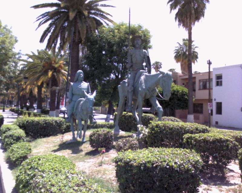 El Quijote, Torreón Coahuila. Photographer: Salvador De los Reyes Delosrjs )